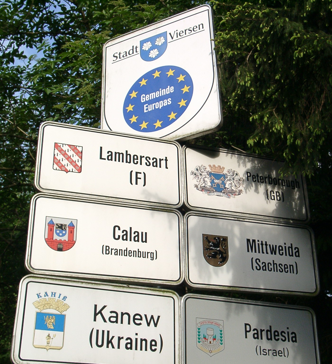 Städtepartnerschaften von Viersen